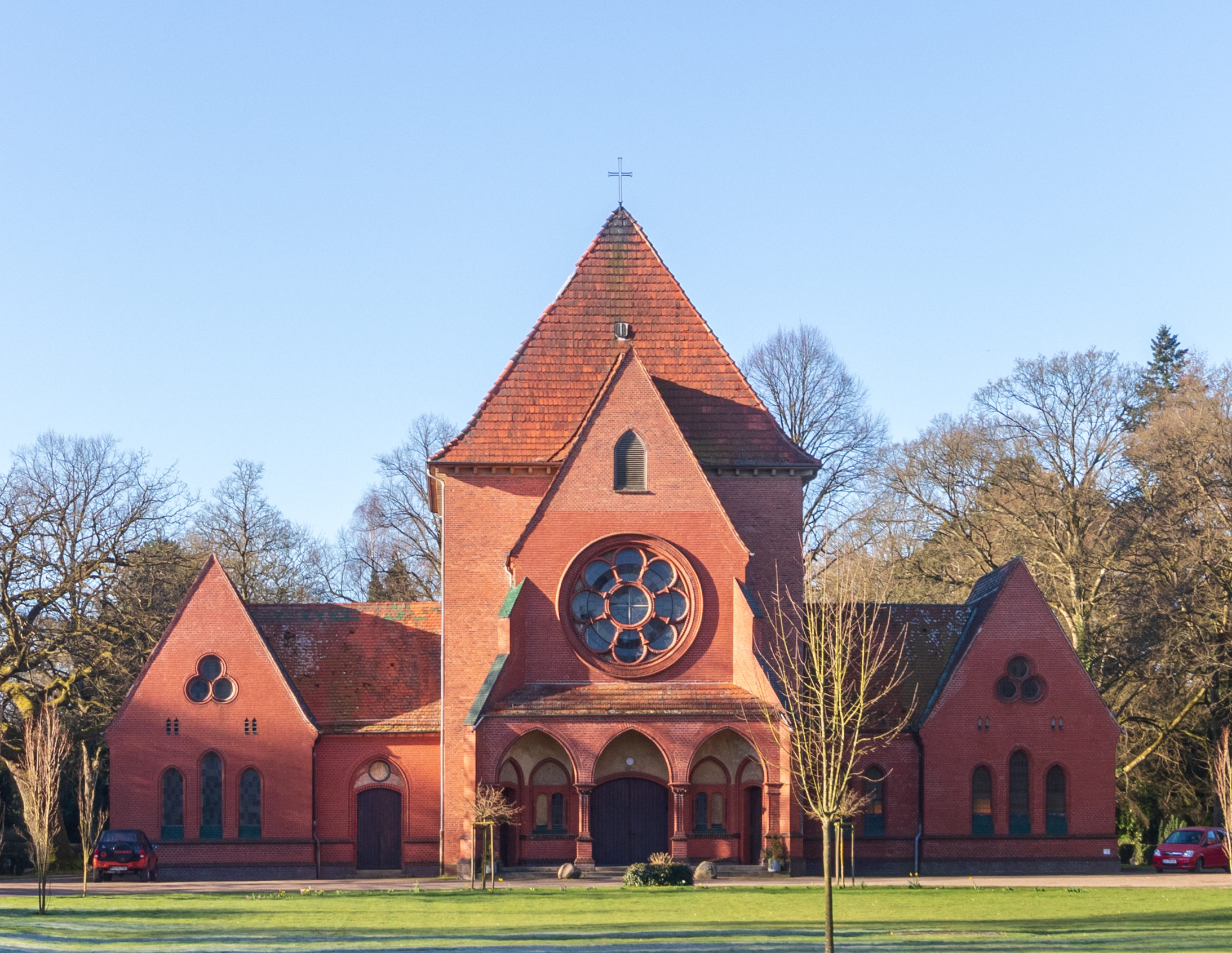 Kapelle auf dem Parkfriedhof Eichhof